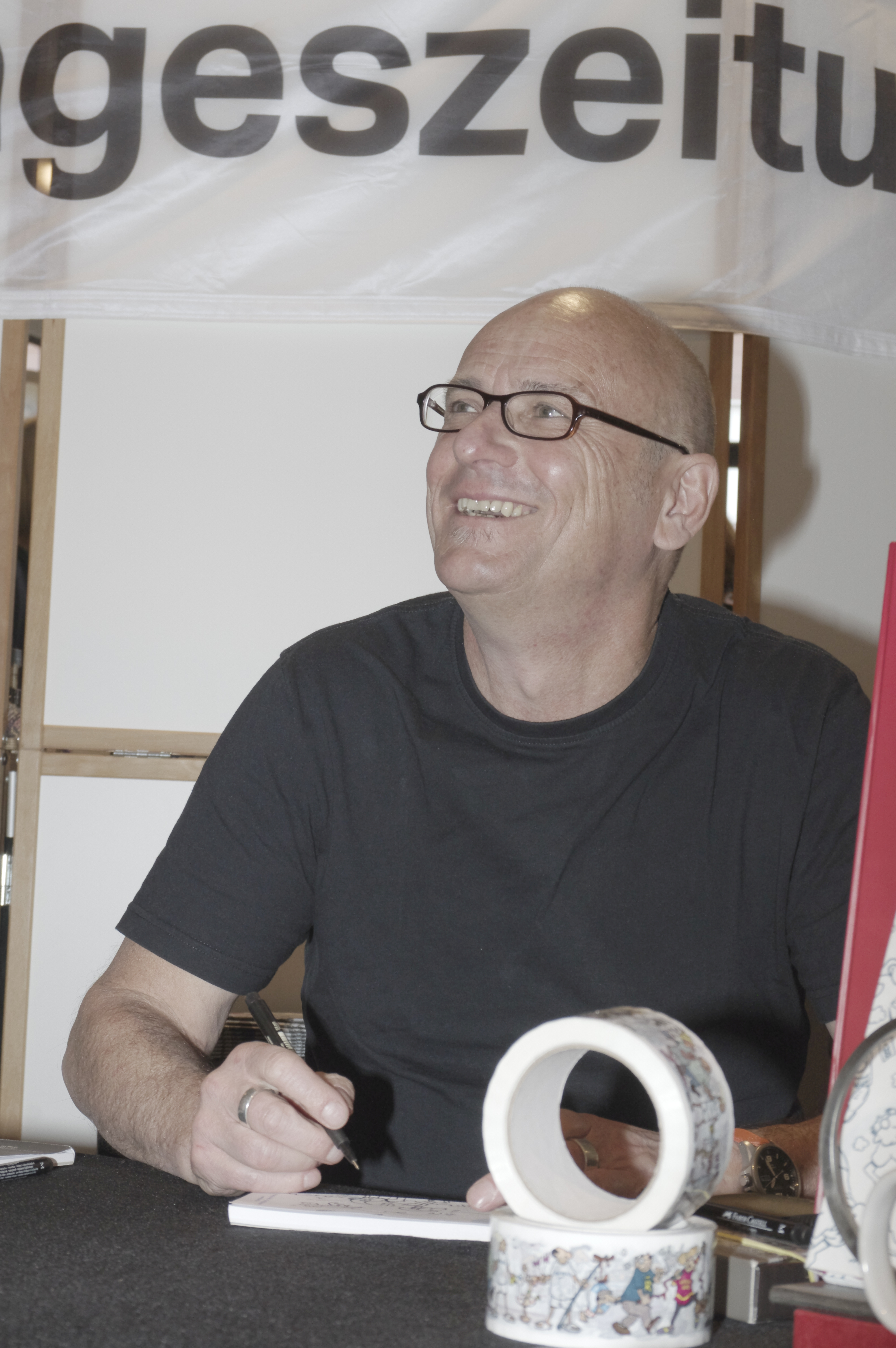 TOM bei der Signierstunde der taz auf dem Weihnachstmarkt im Museum für Arbeit in Hamburg